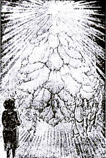 К. Орлов, "Мальчик у Христа на ёлке"